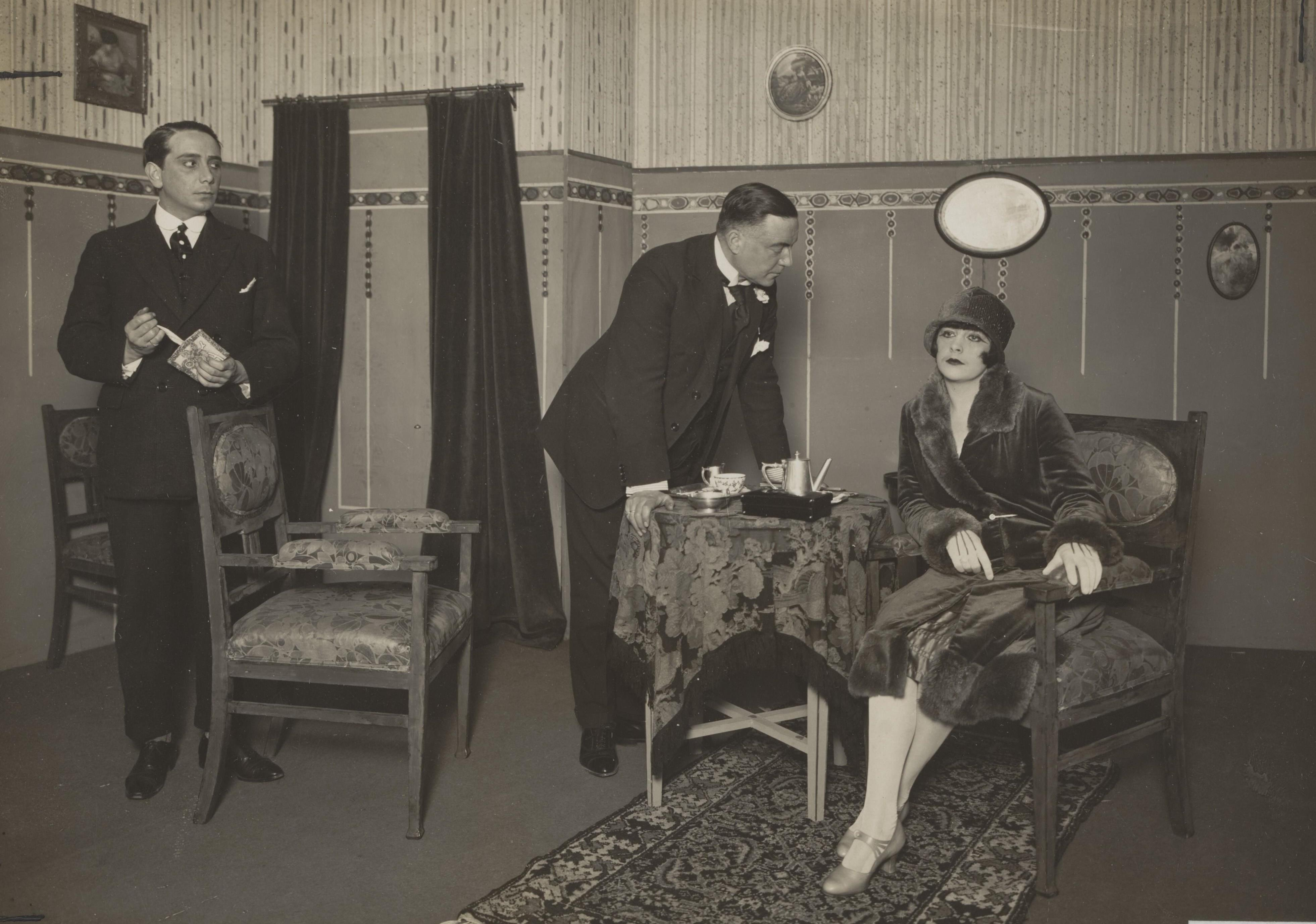 Scenes uit toneelstukken van het Vereenigd Rotterdamsch - Hofstad Tooneel. V.l.n.r.: heer A, heer B, dame C. Datum: 1925; Locatie: Rotterdam. Vijf mogelijke toneelstukken in 1925: En als de ster bleef stille staan, Nora, Moederlegende, Tieneke of Vlindertje